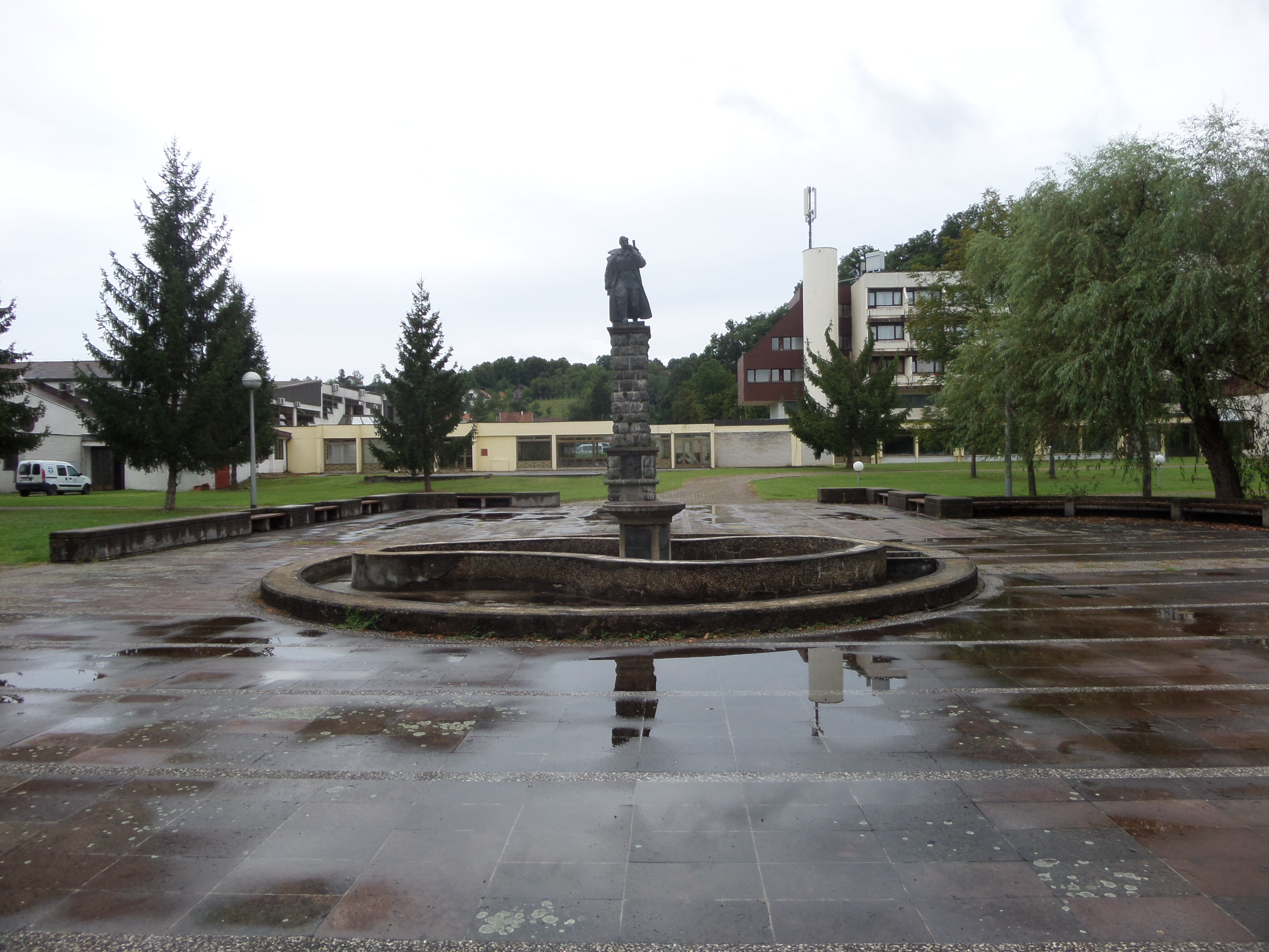 11.08.2016. - 44415, Topusko, Kroatien